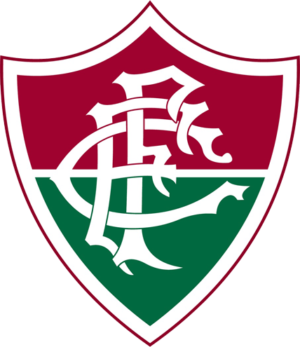 Emblema Fluminense Football Club